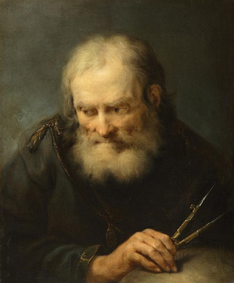 阿基米德畫像